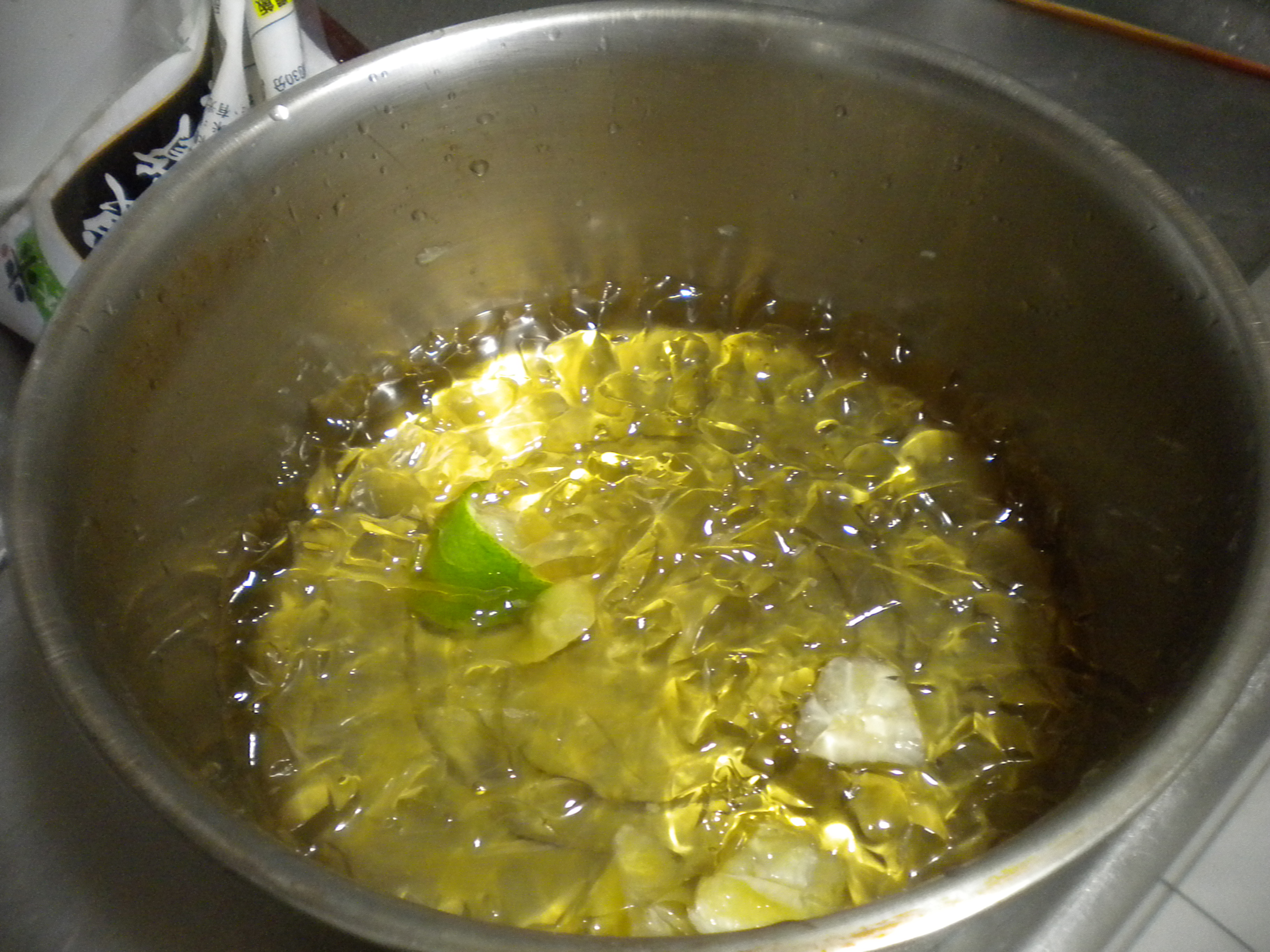 中文（台灣）: 愛玉凍